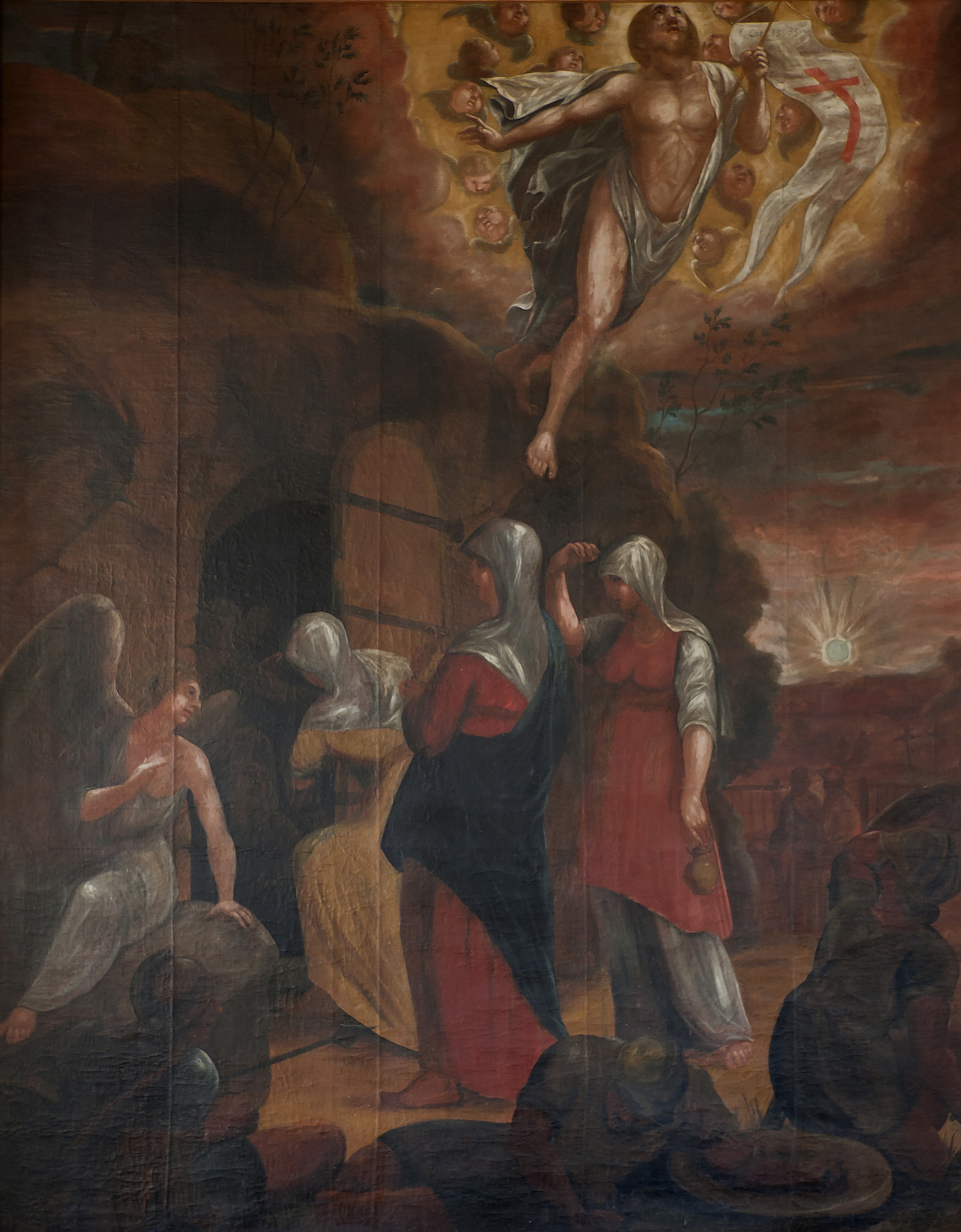 Gammal altartavla i Tjällmo kyrka föreställande Jesu uppståndelse. Målad av Pehr Hörberg, målad 1806, uppsatt som altartavla 1815, flyttad till norra korsarmen 1856.